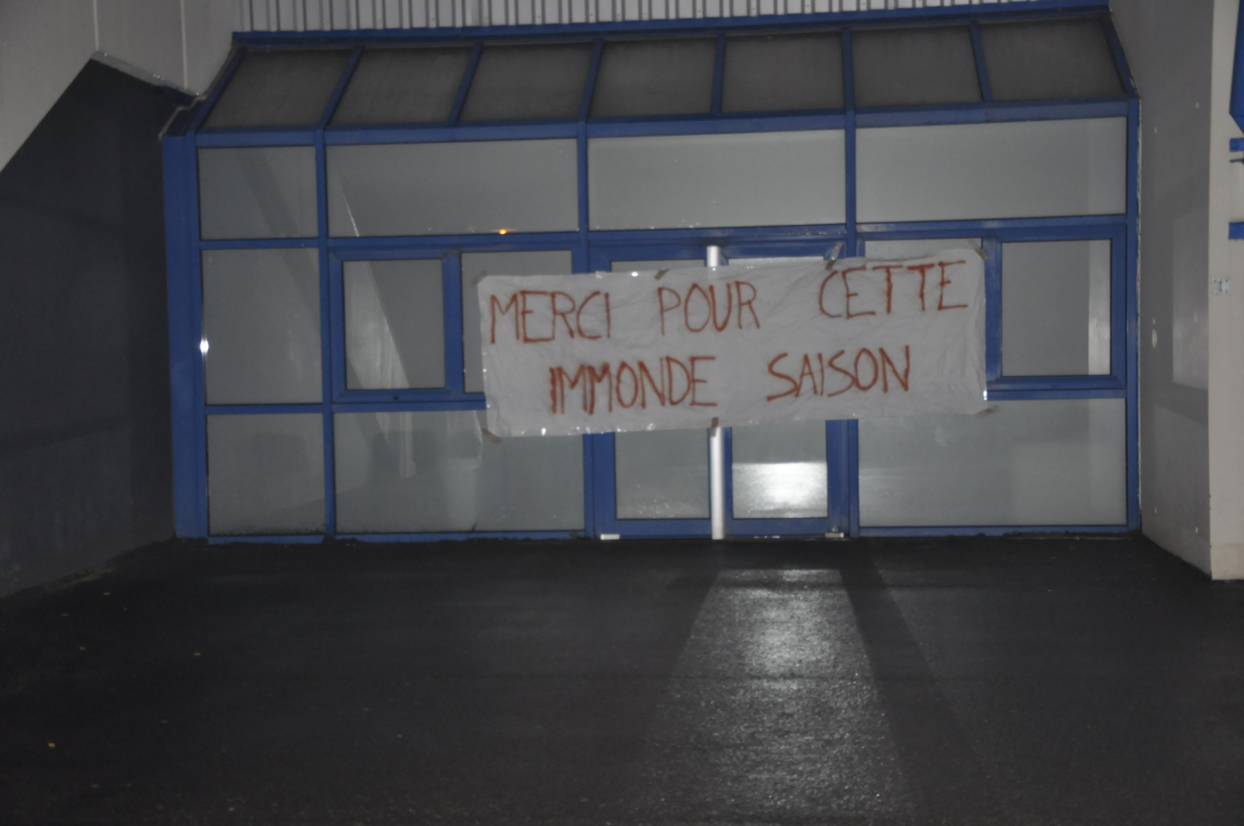 message inscrit sur le stade Michel d'Ornano suite à la relégation du SM Caen en deuxième division